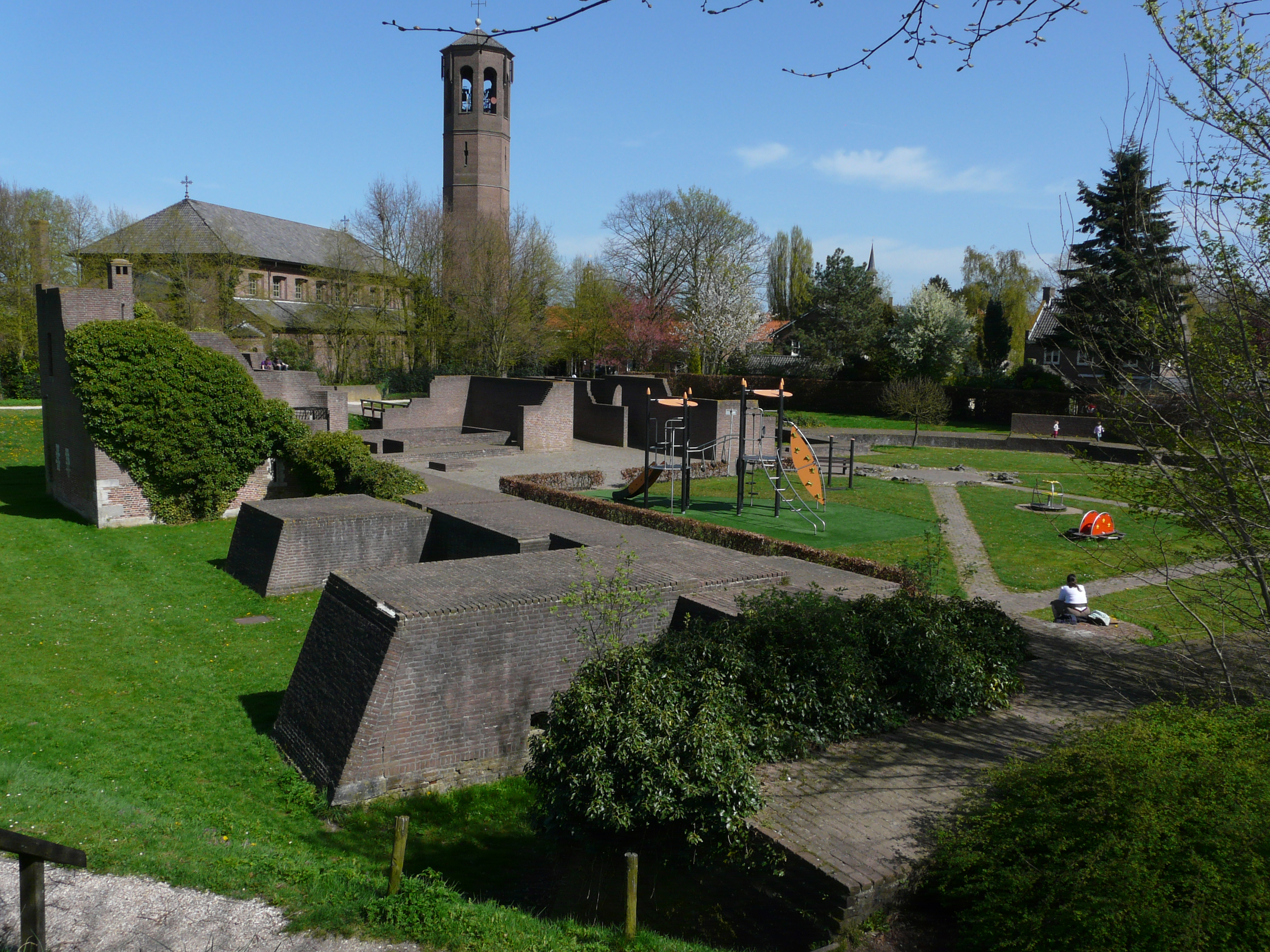 Restanten van voormalige kasteel Heusden